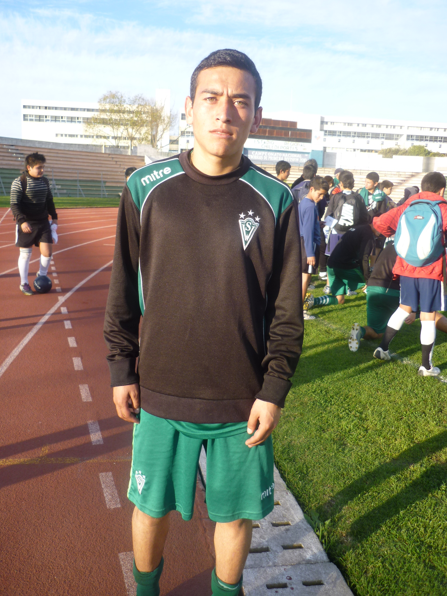 Fotografia de Jefferson Castillo, jugador del Santiago Wanderers, club de fútbol de la primera división de Chile.